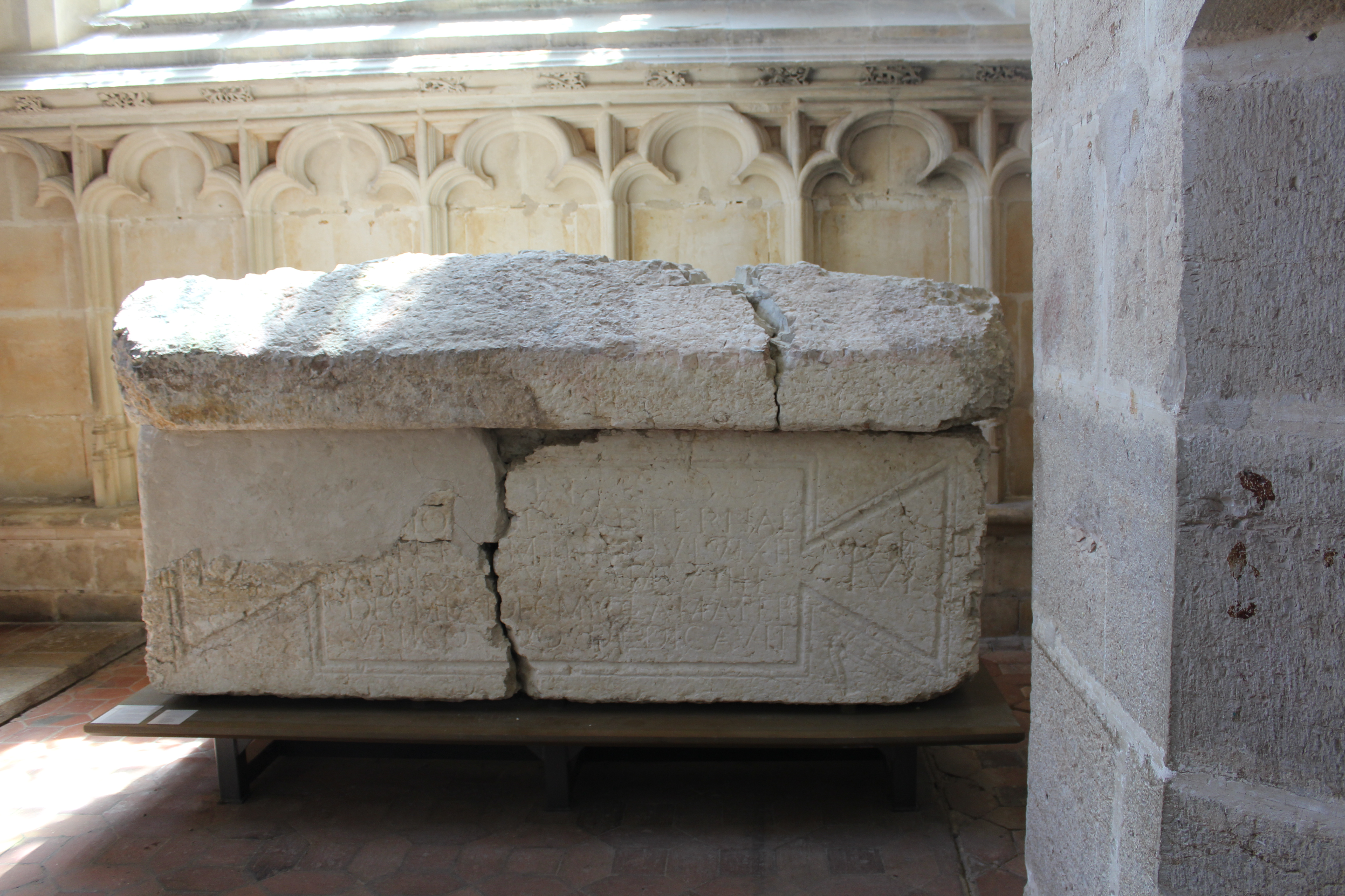 Sarcophage de L. Decmia datant de l'époque gallo-romaine trouvé sous le sol-sous du parvis de l'église de Brou lors des fouilles de 1953. Est inscrit sur la tombe : ET ORIAE AETERNAE TI DOMITII QVI VIXIT ANNOS XVI M S VIIII DECMIA DECMIOLA MATER VNICO SVO DEDICAVIT. En français : Aux dieux mânes et à la mémoire éternelle de Titus Domitius qui vécut 16 ans et 8 mois. Decmia Decmiola sa mère a élevé ce monument à son fils unique.